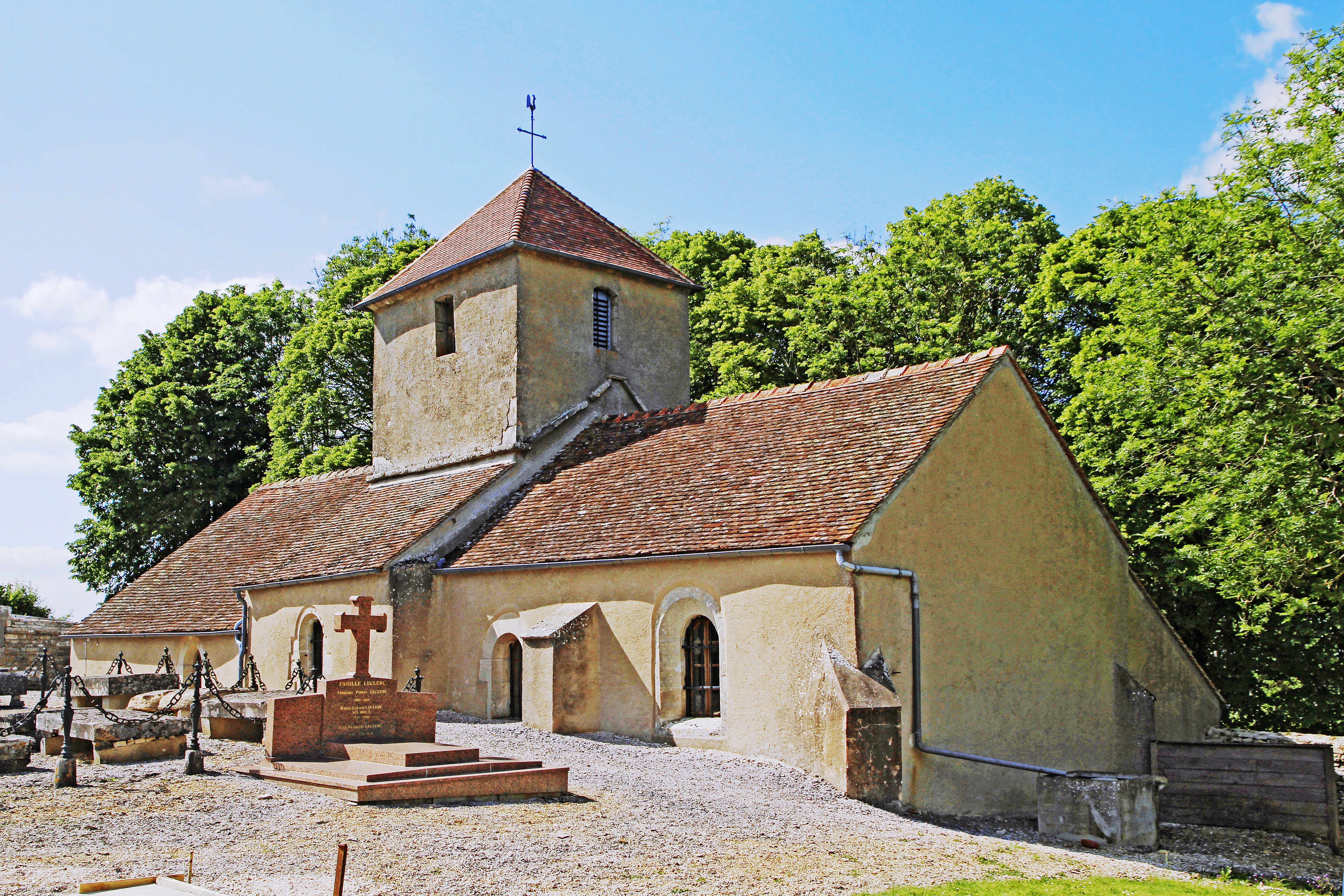 Église de la-Nativité-de la-Vierge au hameau de la Chaleur (commune de Vieilmoulin)